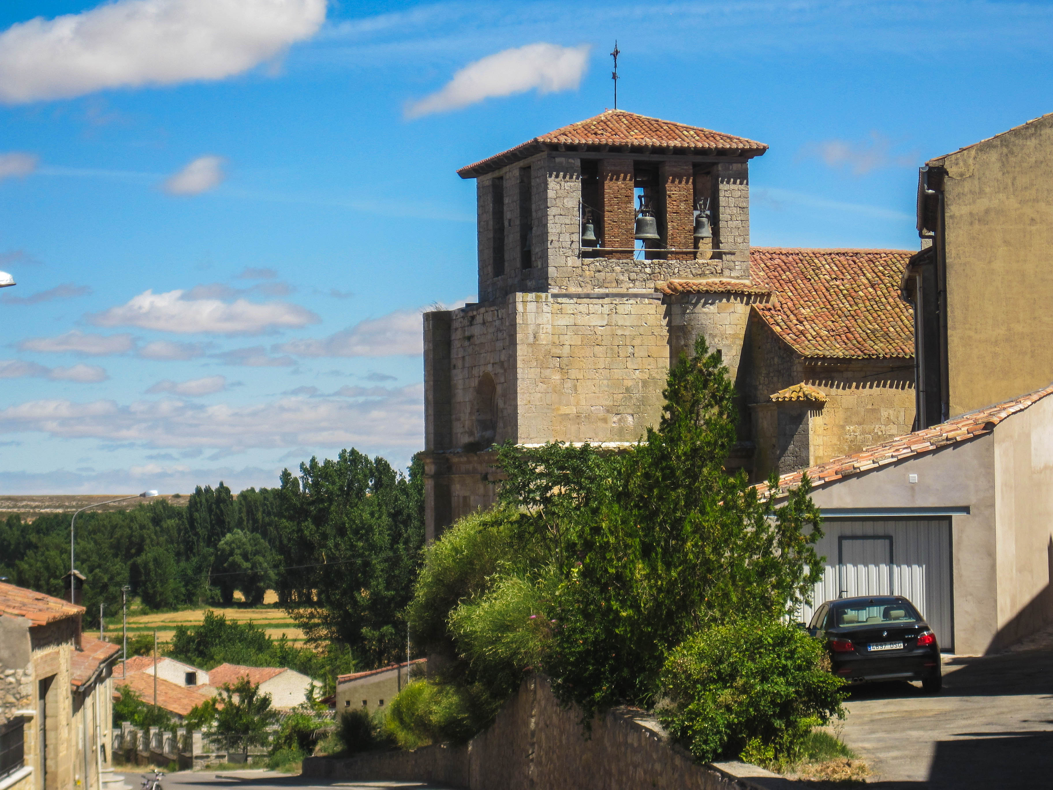 iglesia de villafruela desde otra perspectiva